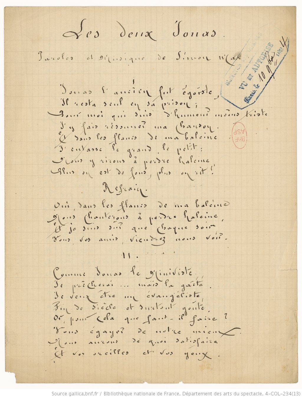 Titre : Fonds Maxime-Fabert (1899-1978). I. Famille Simon-Girard. I.2. Simon Max et Juliette Simon-Girard. Simon Max. Casino de Villerville (1893-1913). Baleine de Villerville. La Baleine au Casino de Paris. Textes de chansons composées par Simon Max